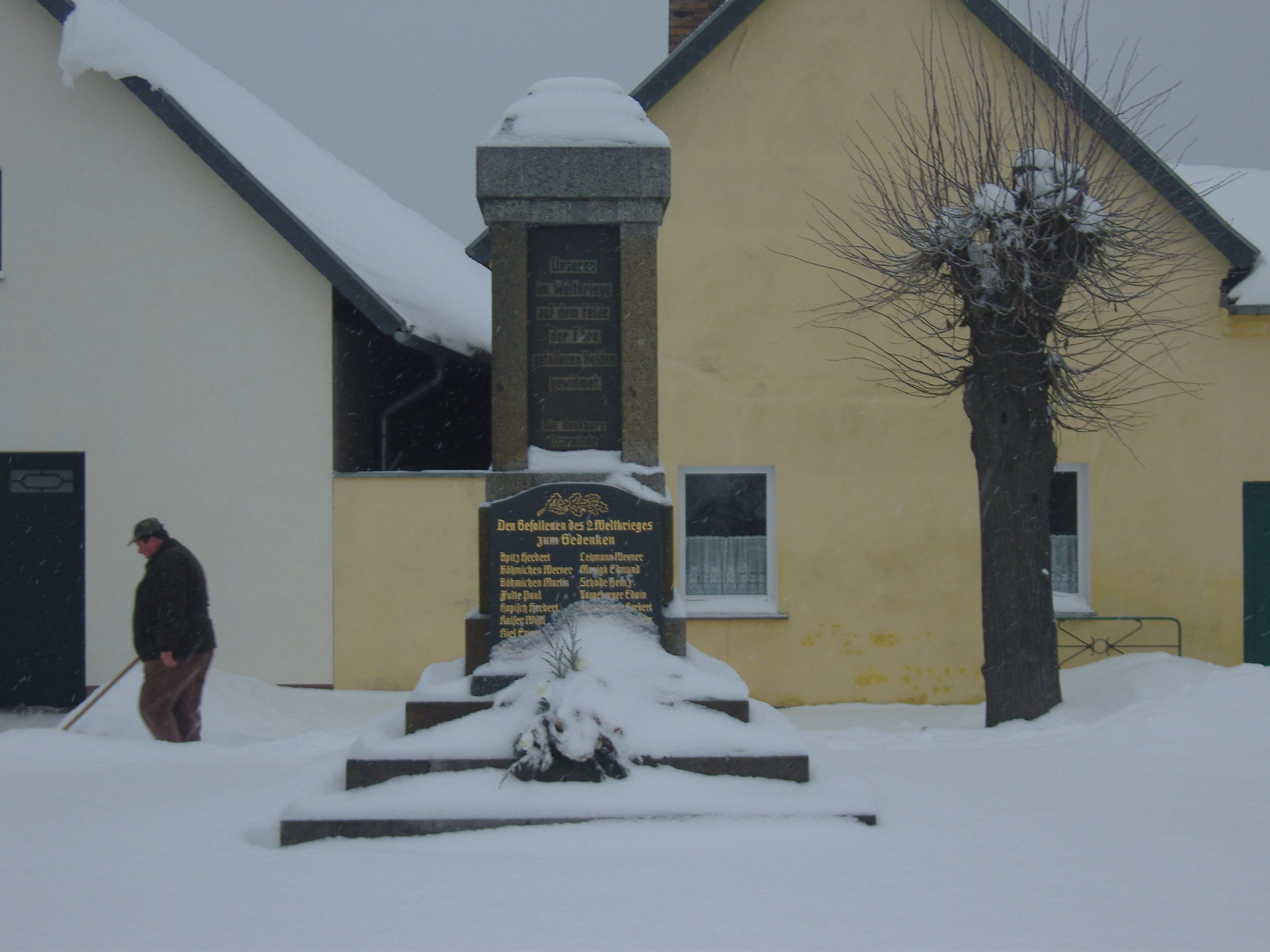 Kriegerdenkmal für die Gefallenen des Ersten Weltkriegs in Lichtena